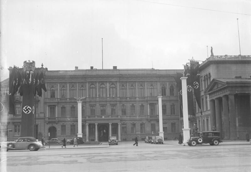 Amerikanische Botschaft Berlin, 5.5.39